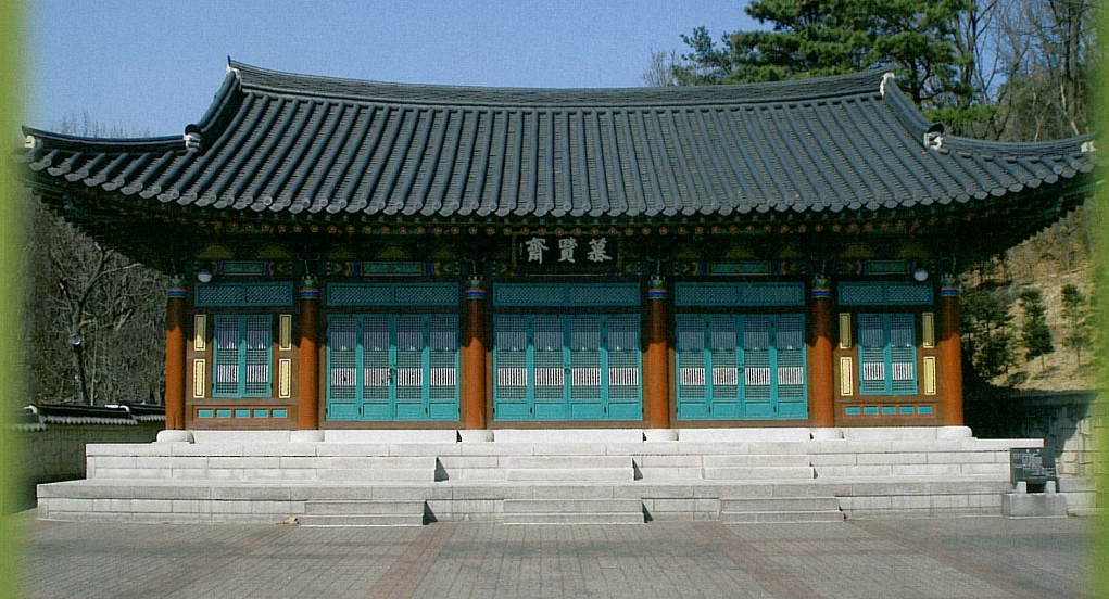 사천목씨(泗川睦氏)재실(齋室)모현제(慕賢齋)